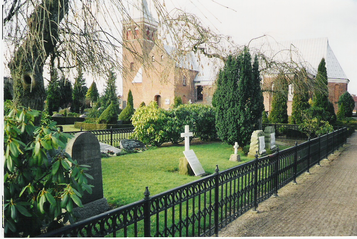 Familien Rosenkrantz gravsted på Hornslet Kirkegård